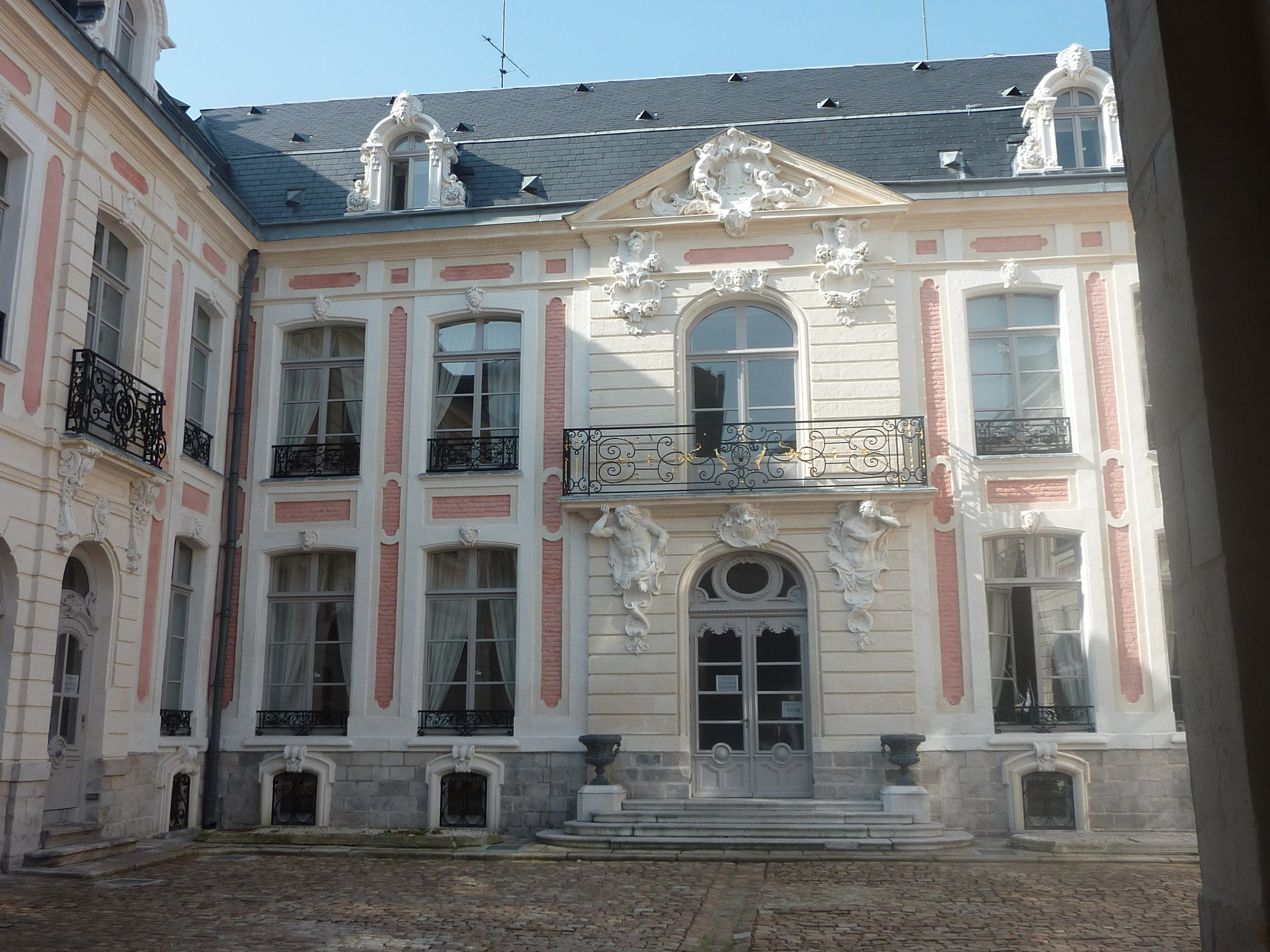 Hôtel Dubois de Fosseux à Arras, actuelle Chambre régionale des Comptes